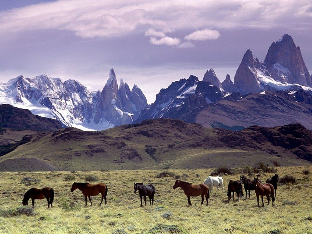 Pferde grasen auf der Weide am Fuße des Fitz Roy in Patagonien